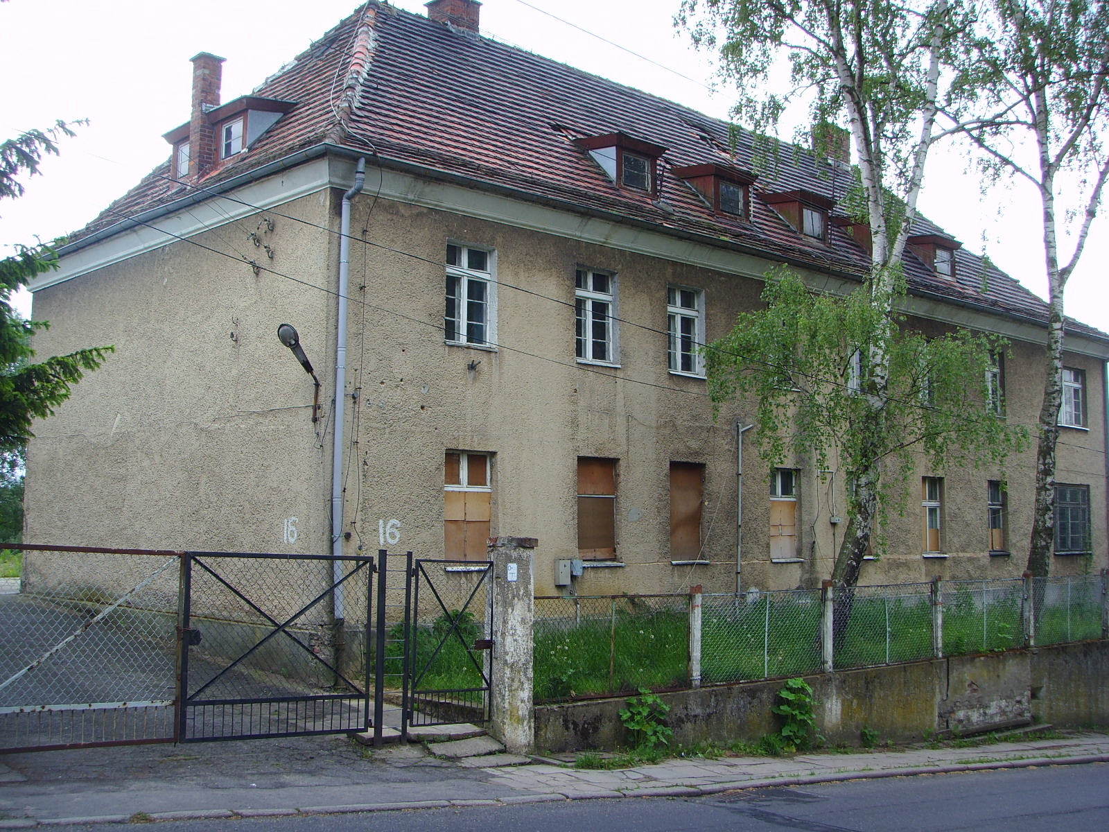 Byłe koszary strażnicy Golęcino WOP w Szczecinie (ul. Strzałowska 16)